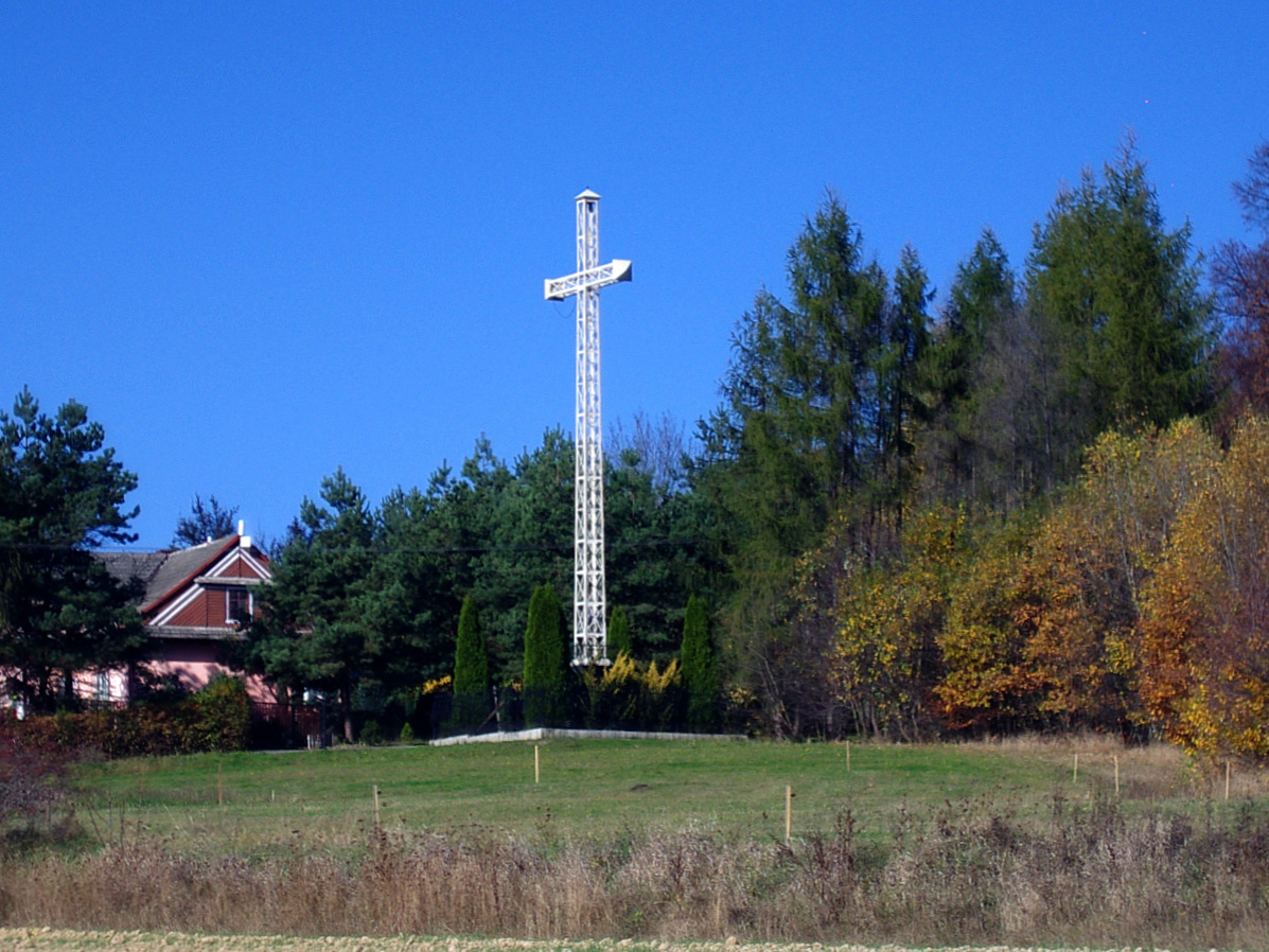 Krzyż w Kobylcu